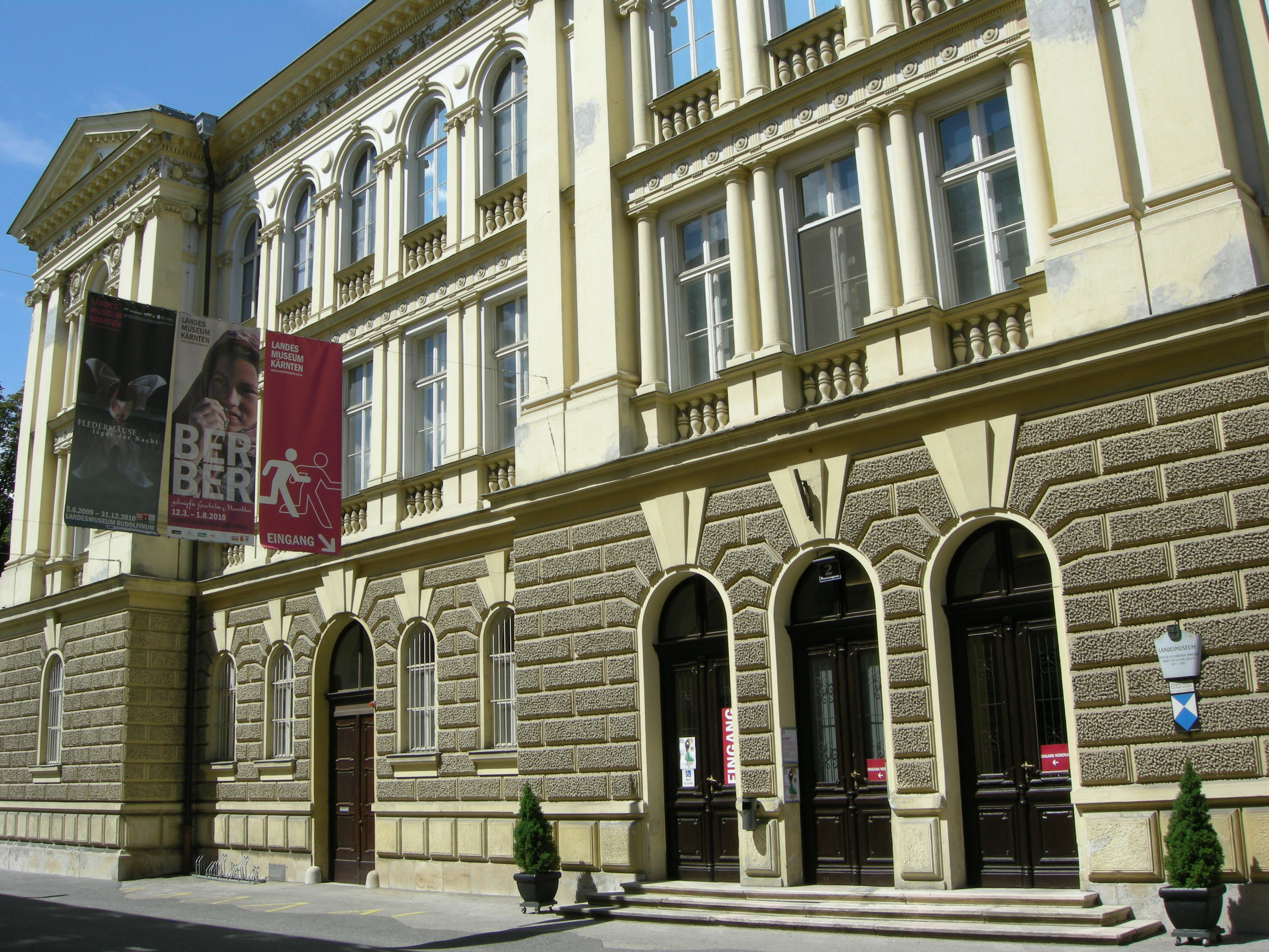 Landesmuseum für Kärnten, esterno